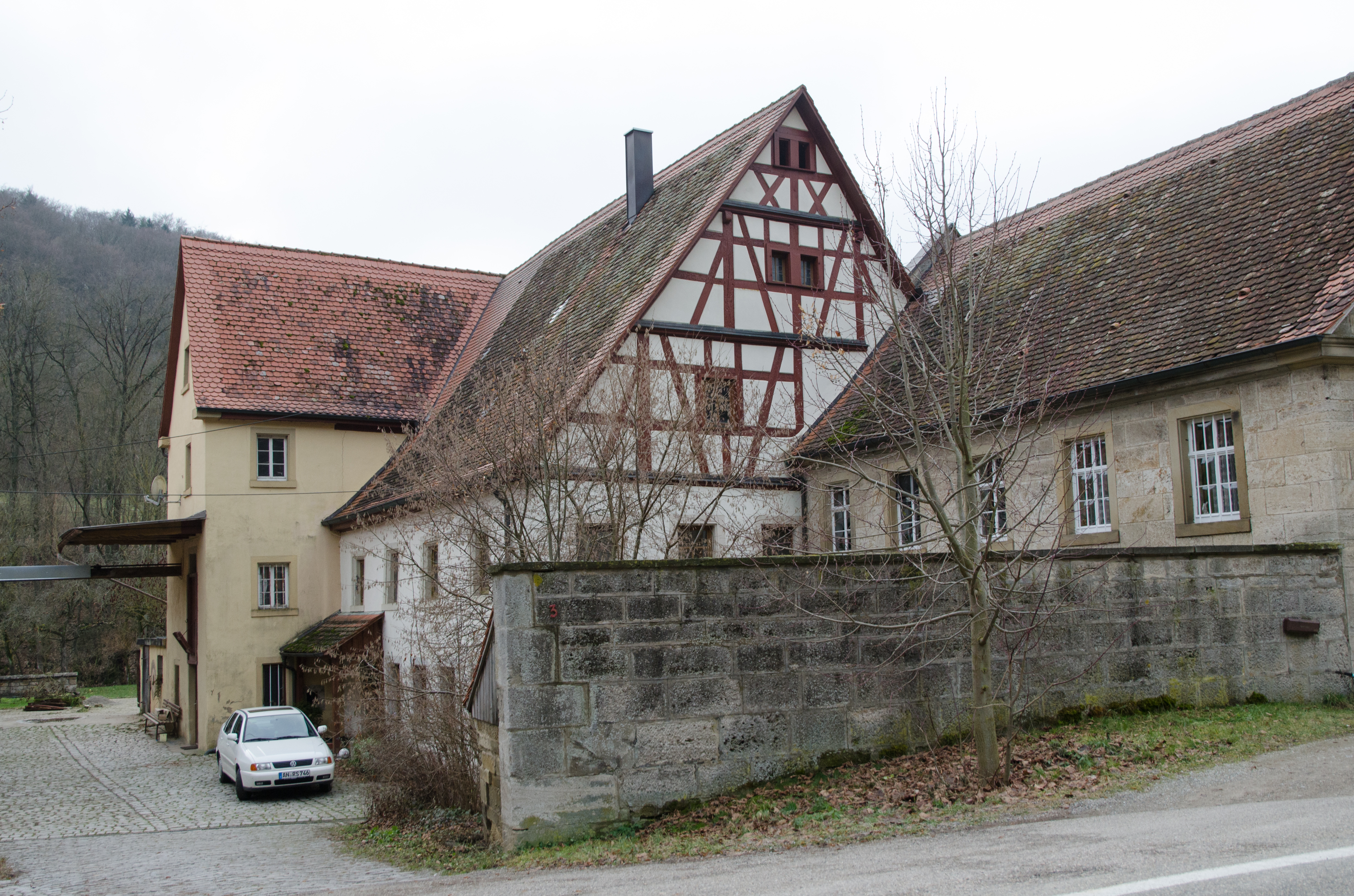 Rothenburg, Schwarzenmühle